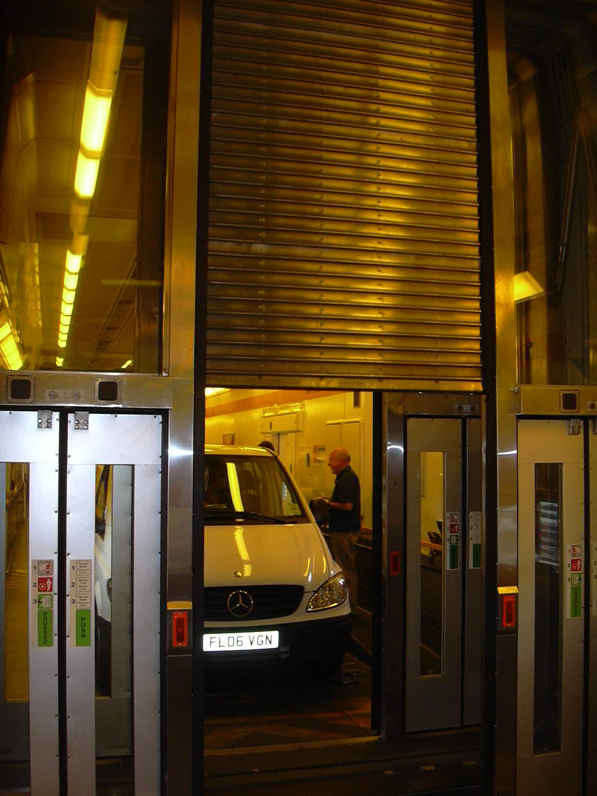 A Csalagútban közlekedő szerelvény belseje